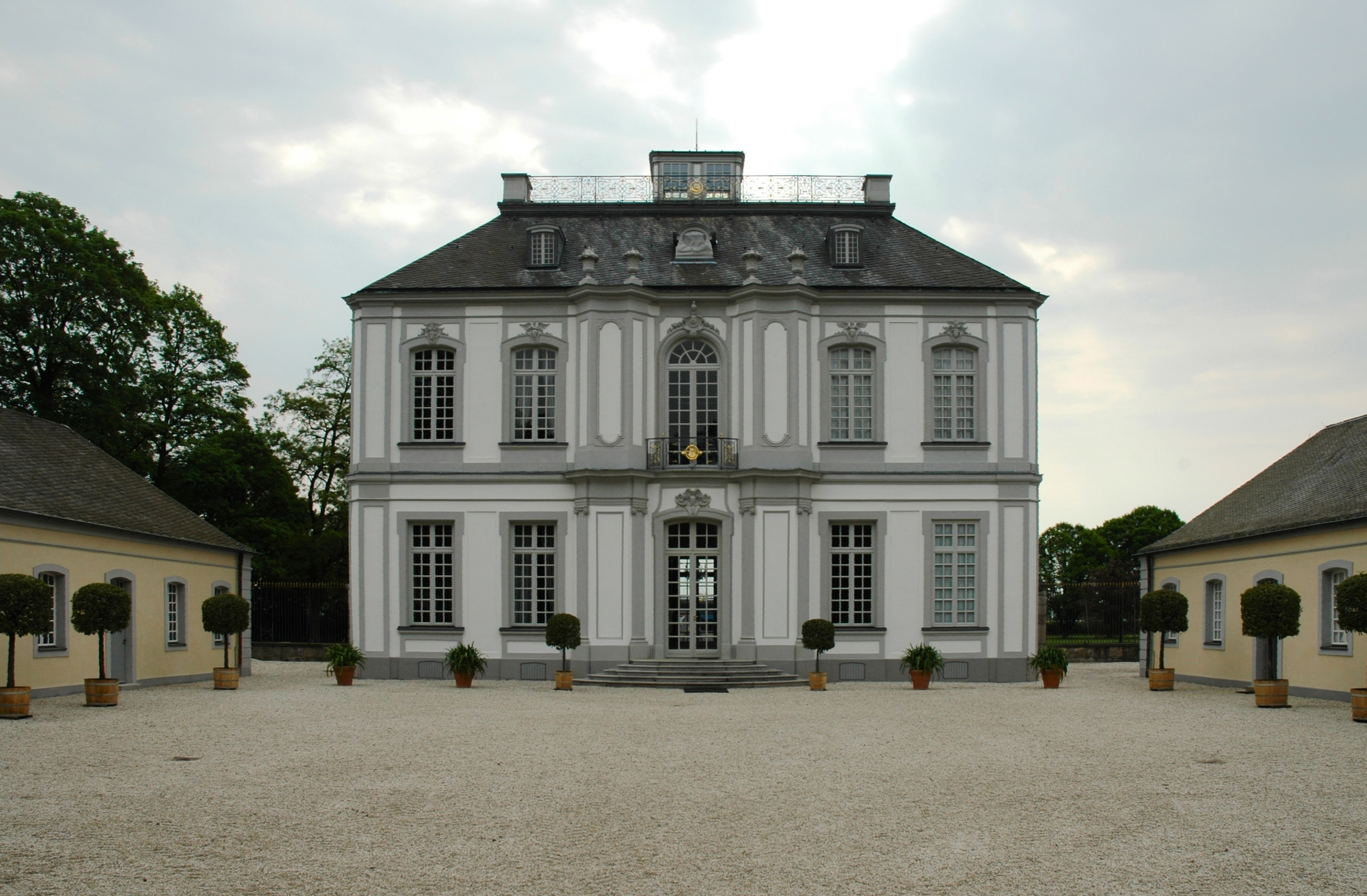 Falkenlust Palace in Brühl, western aspect